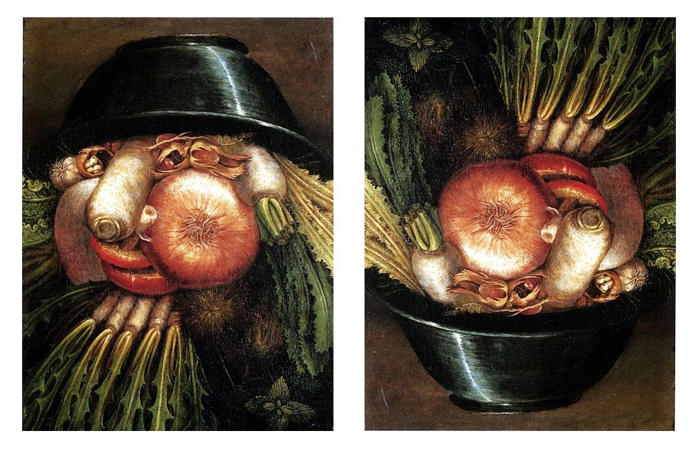 Seeltersk: Ju Skilleroatsje wiest Aan Pot ful Gräinieten, of dät Ounsicht fon aan Mon, aal deerätter, wo dät troald is. Hier häbe iek dät so un so troald ieuwenske eenuur stoald.